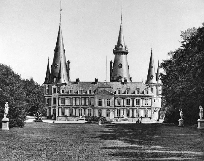 Südwestliche Fassade des Schlosses Fréfossé in Le Tilleul, Seine-Maritime, Frankreich